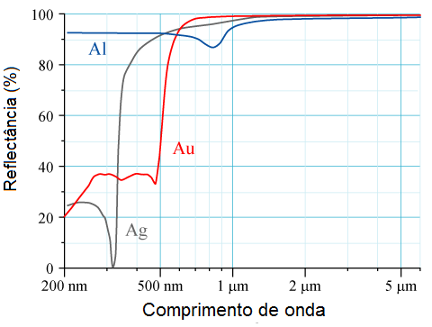 reflexividade metais